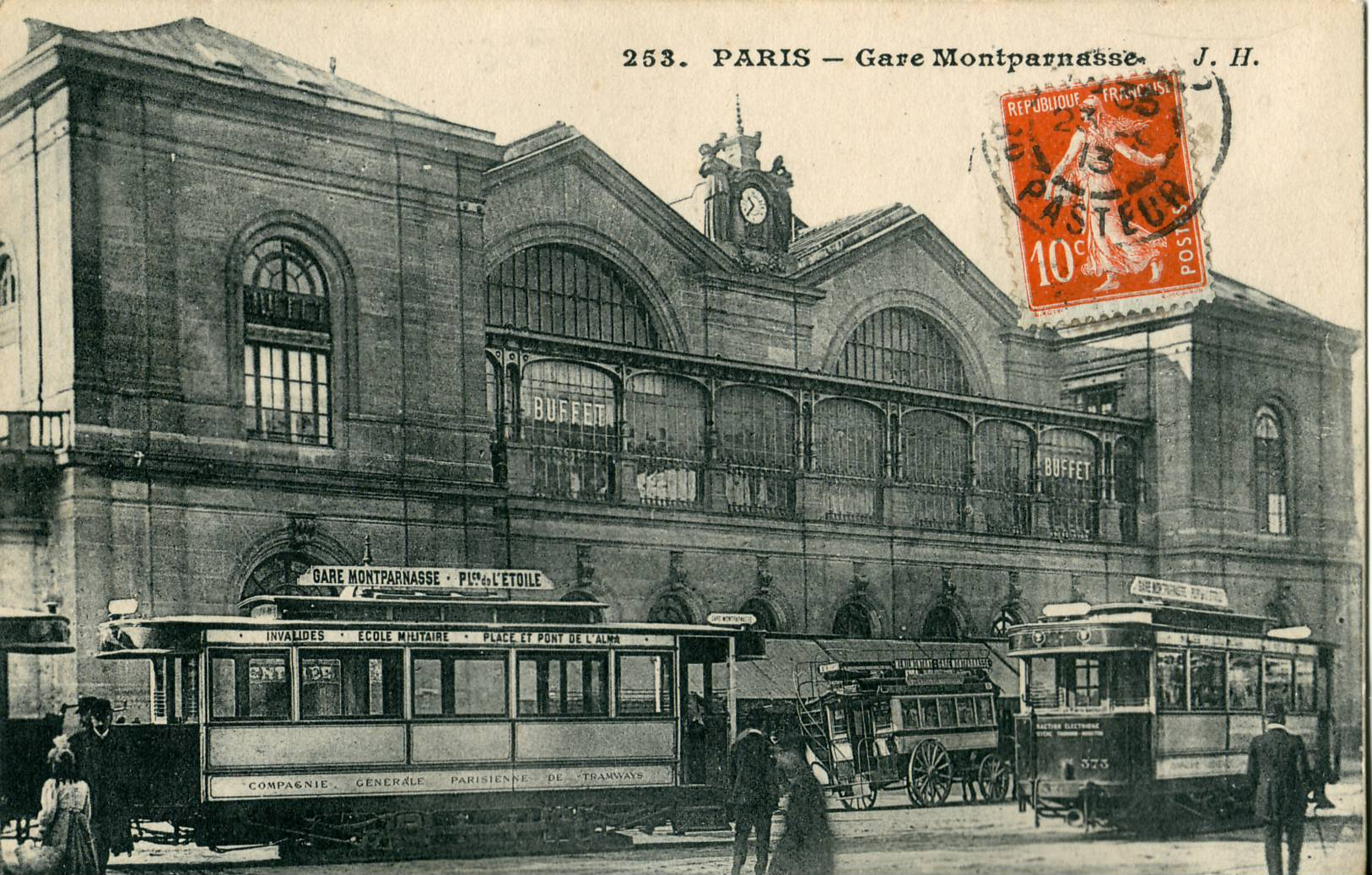 Carte postale ancienne, éditée par JH N°253Paris : La Gare MontparnasseVue au premier plan d'un tramway de la TPDS (ligne Montparnasse - Étoile) et un omnibus, sans doute de la CGO (ligne Ménilmontant - Place Montparnasse)